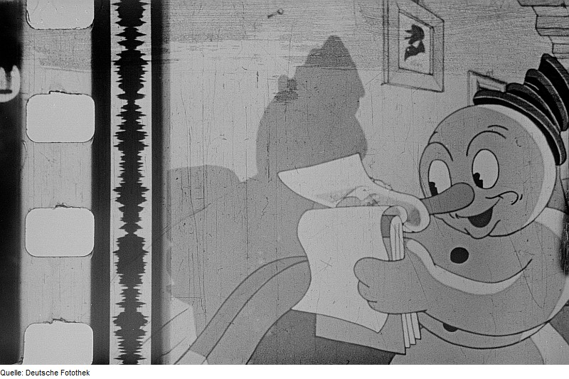 Original image description from the Deutsche FotothekMakroaufnahme eines Einzelbildes des Tontrickfilms "Der Schneemann" (1944)